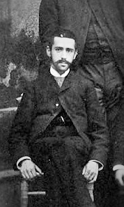 (détail)